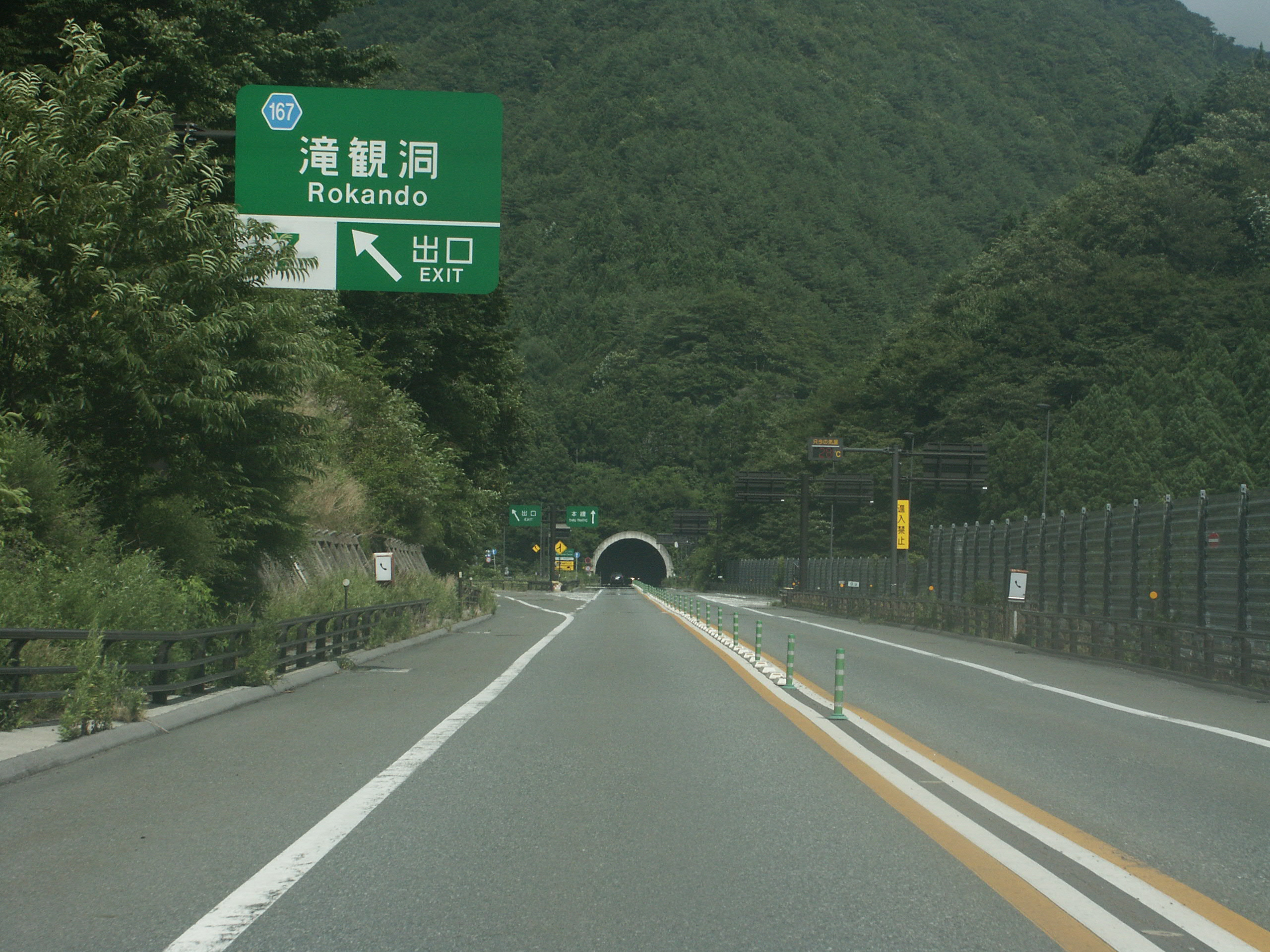 仙人峠道路 滝観洞インターチェンジ出口付近（花巻JCT方面側）